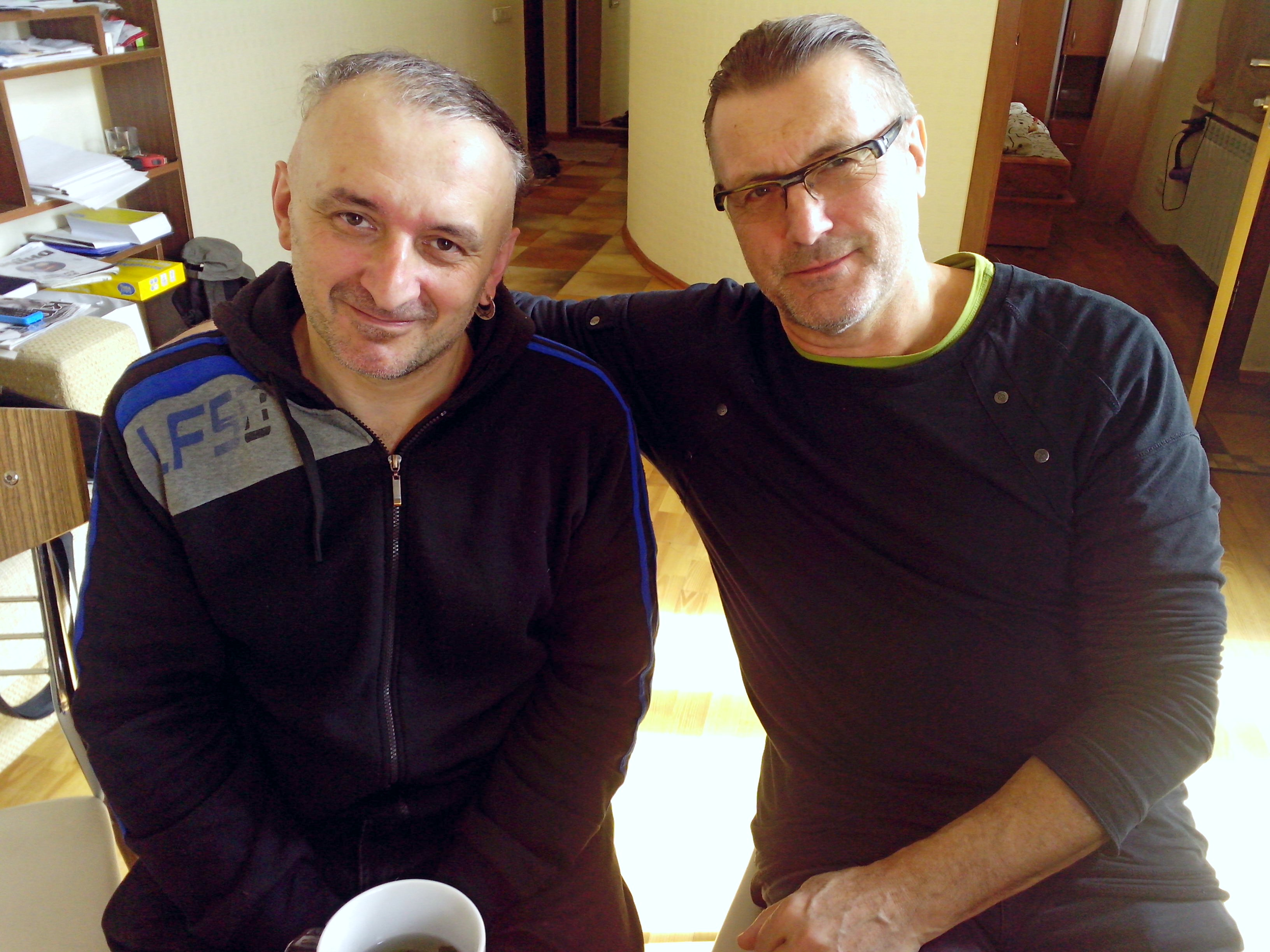 Аркадій Поважний, Григорій Гладій. Київ, березень 2015